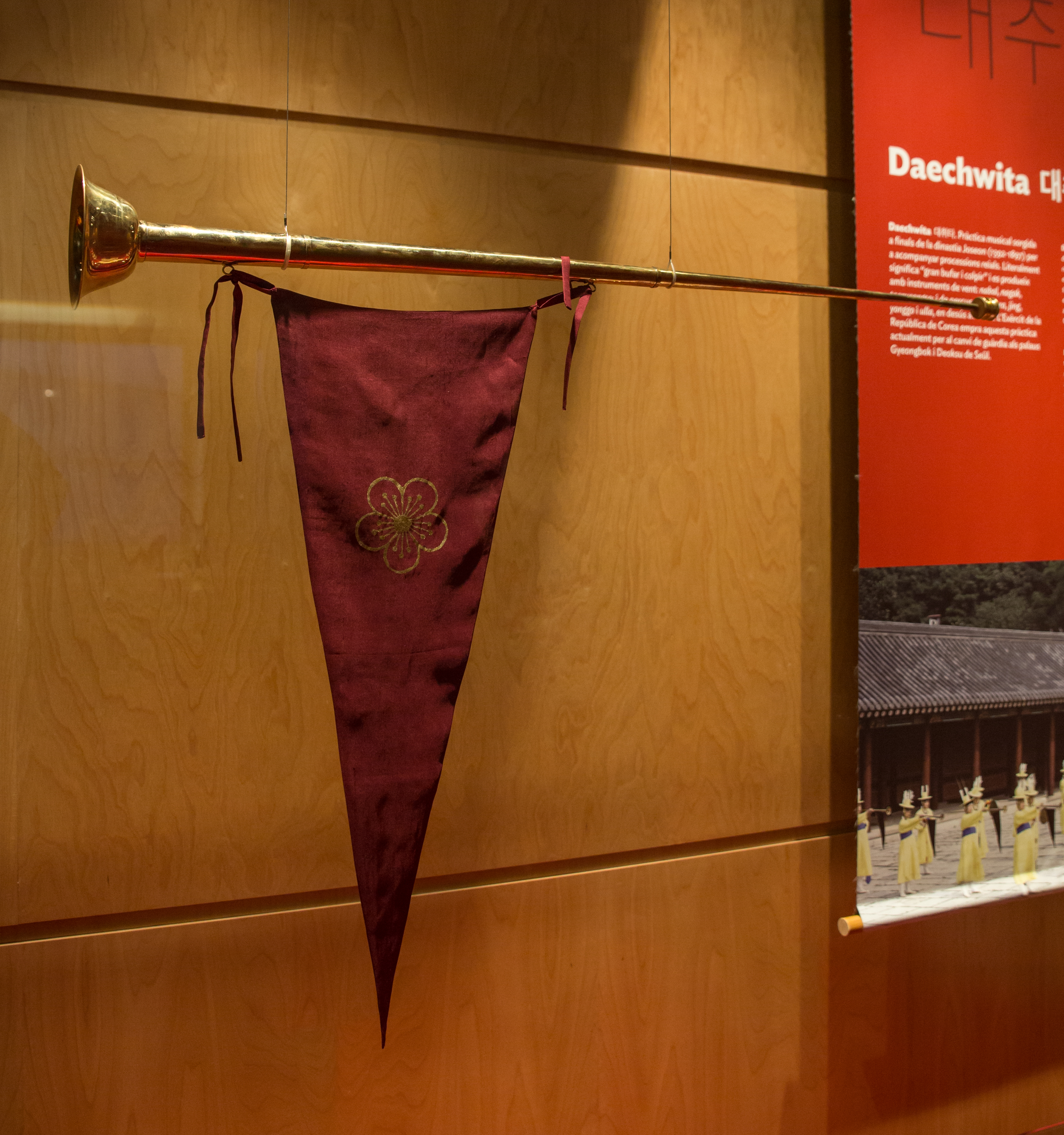 Nabal, exposat a Eolssigu! Els sons de Corea